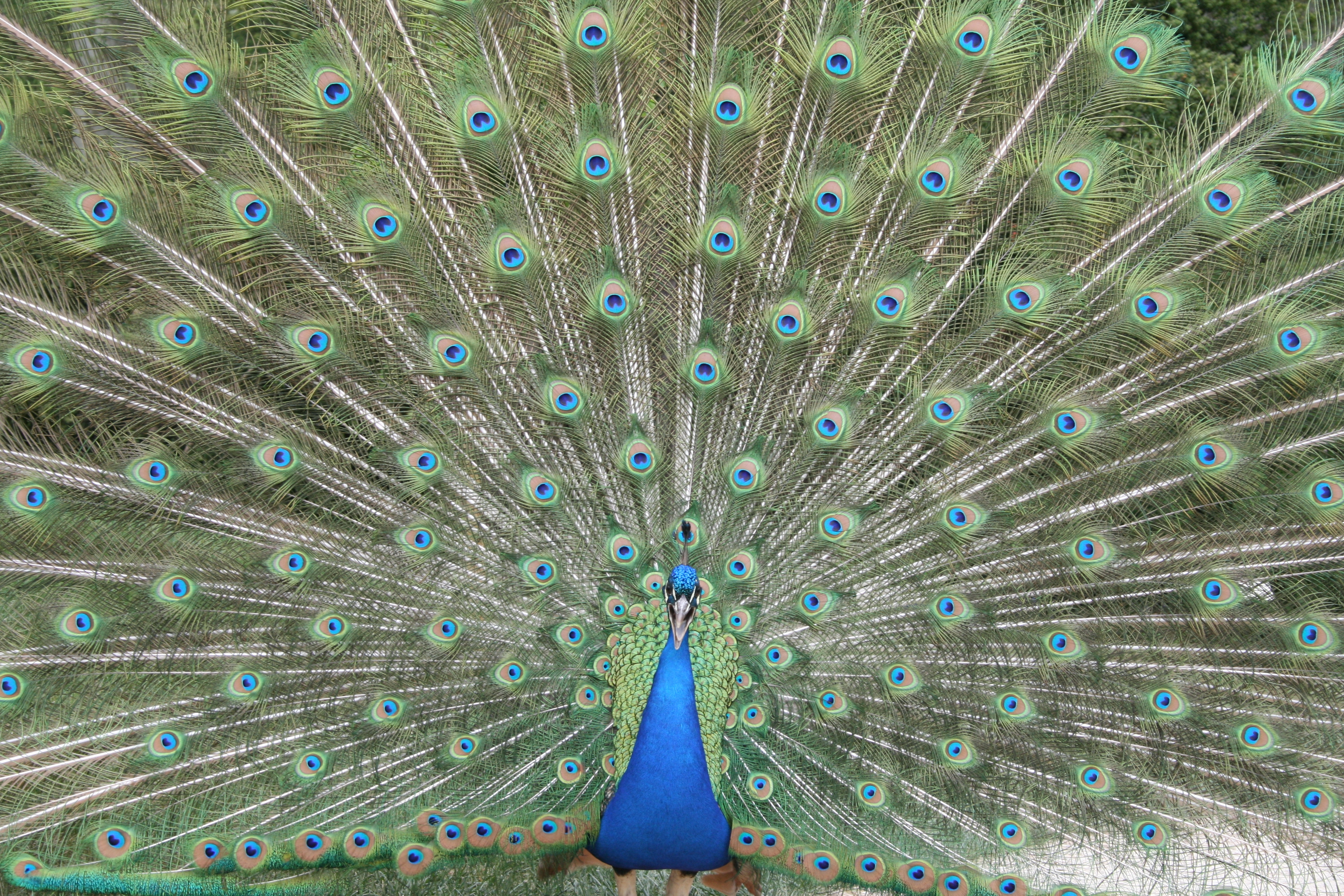 blauer pfau